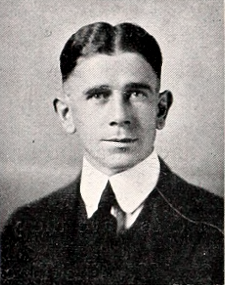 Edward "Jiggs" Donahue